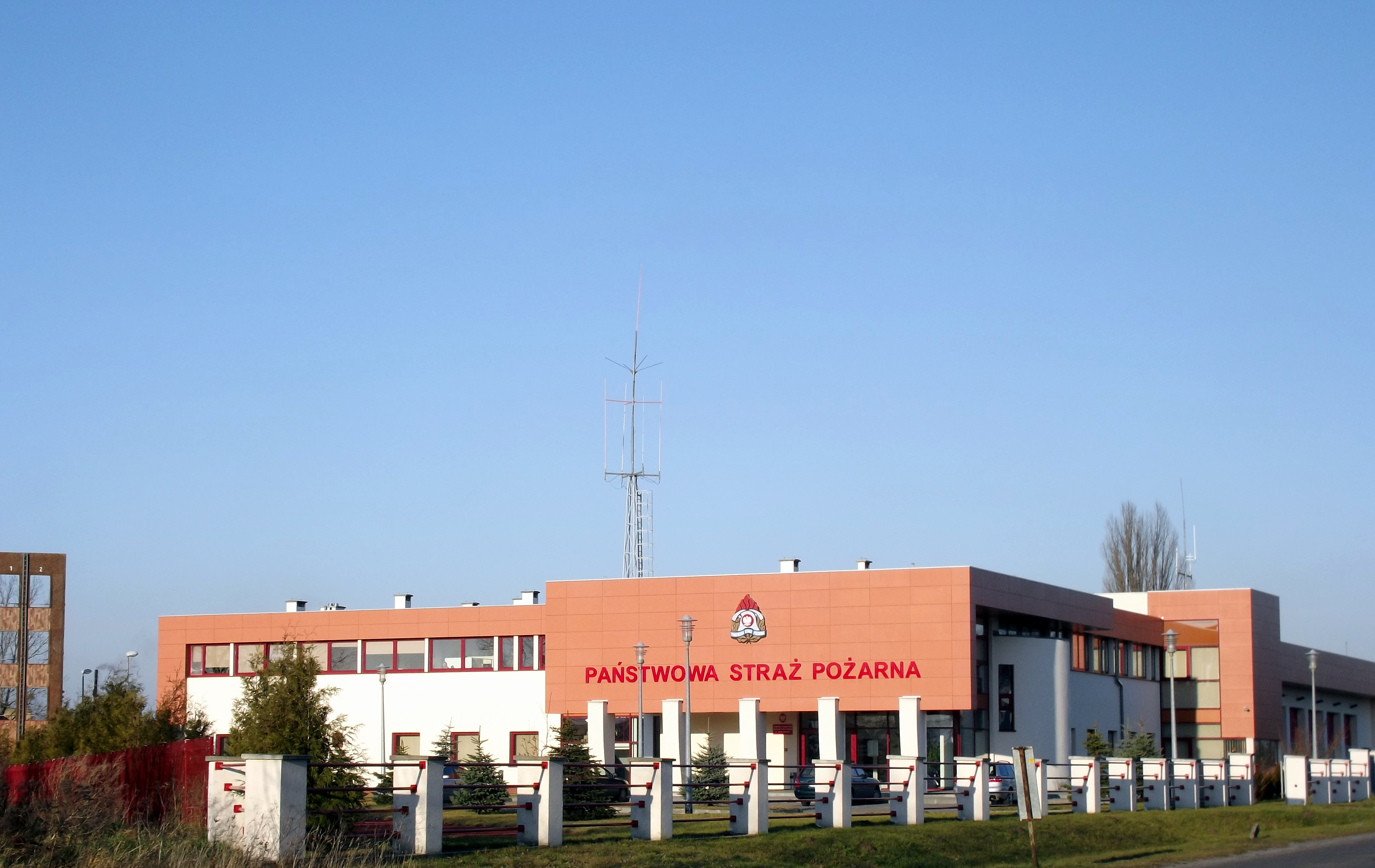 Komenda Powiatowa PSP w Międzyrzeczu, ul. Fabryczna